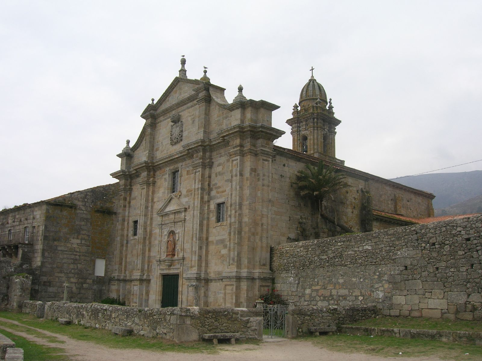 Fachada barroca Mosteiro de Santa María de Oia